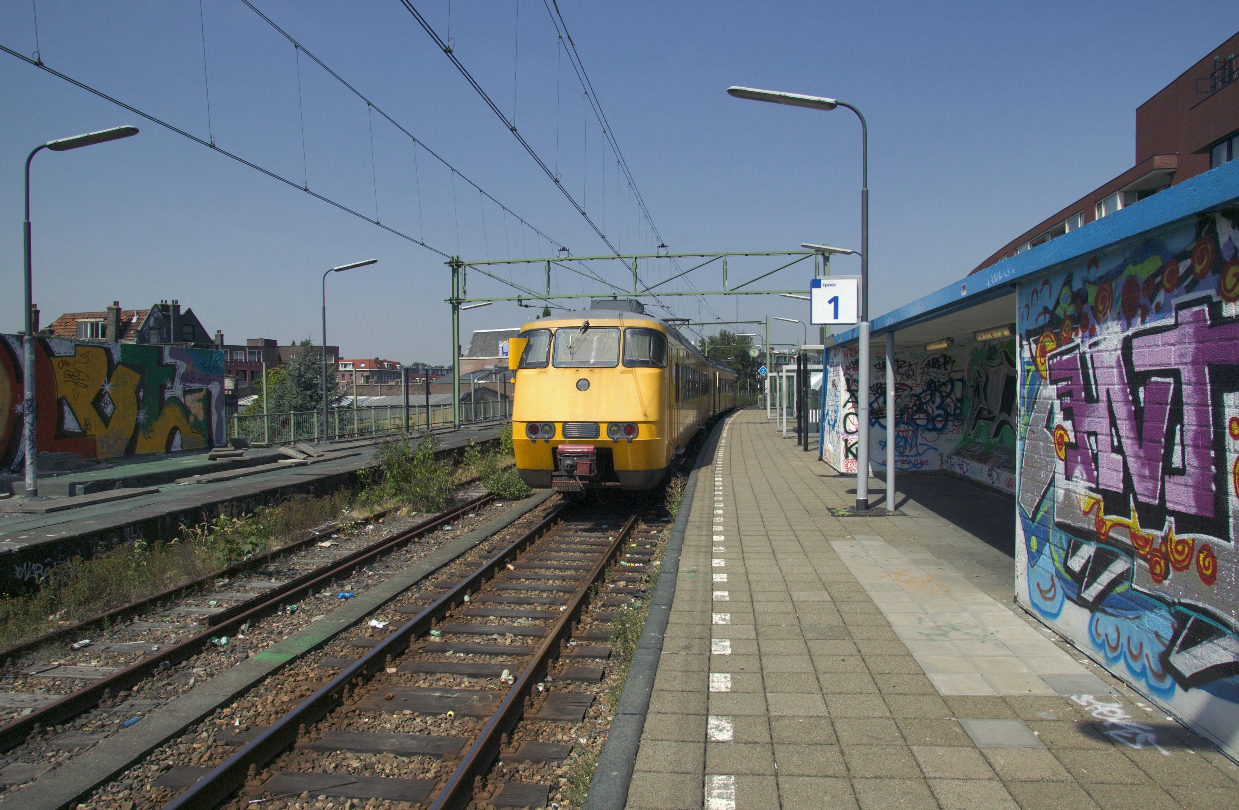 Hofpleinlijn: Station boven perron